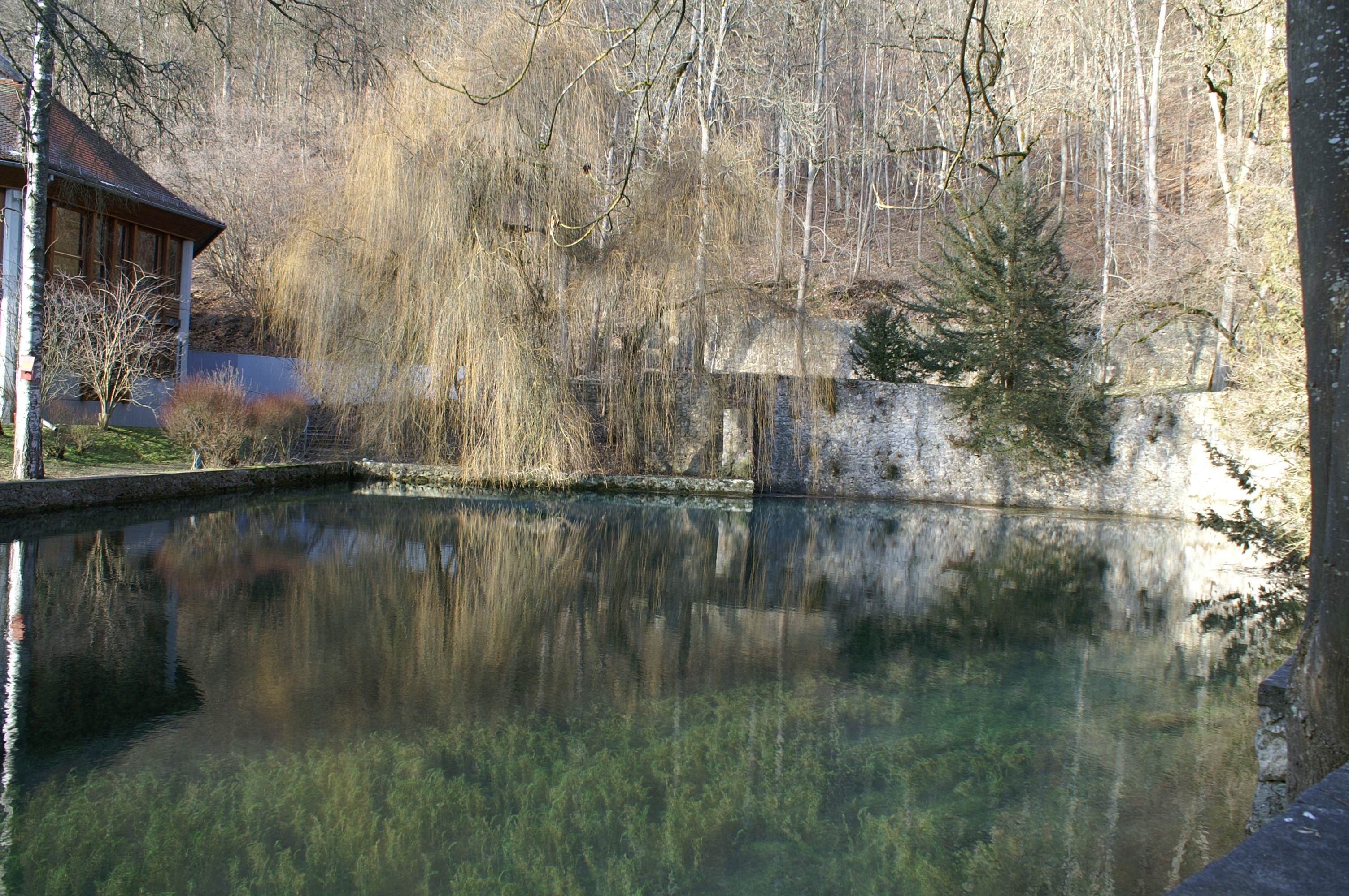 Der Urspring-Quelltopf, eine große Karstquelle. Der Topf ist von einer Natursteinmauer umfaßt. Die Karstquelle liegt in einer von der Urdonau verlassenen Talschlinge bei Schelklingen.